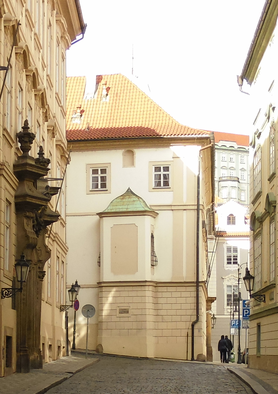 Malá Strana, Prague 1, Czech Republic